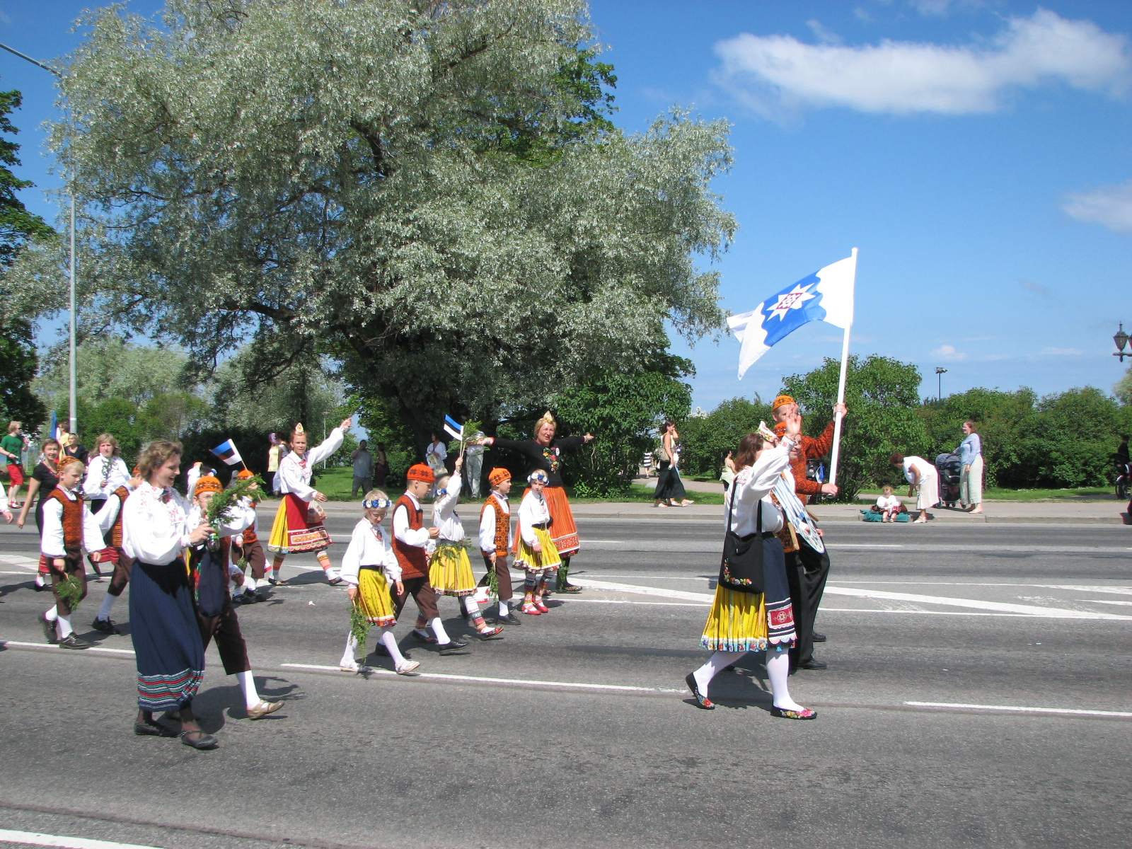 Muhu Põhikooli õpilased XI noorte laulu- ja tantsupeo rongkäigus